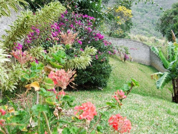 Jardin en el Junko - Estado Vargas Venezuela